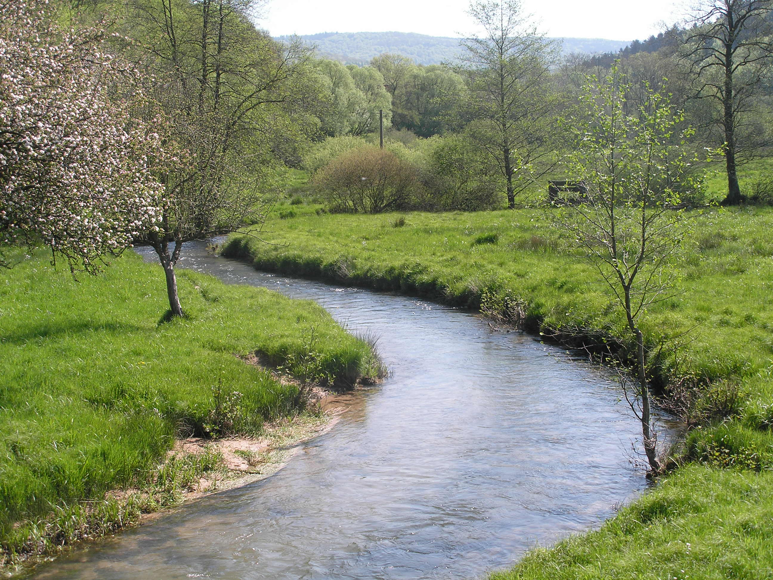 NSG Hafenlohrtal, bei Lichtenau